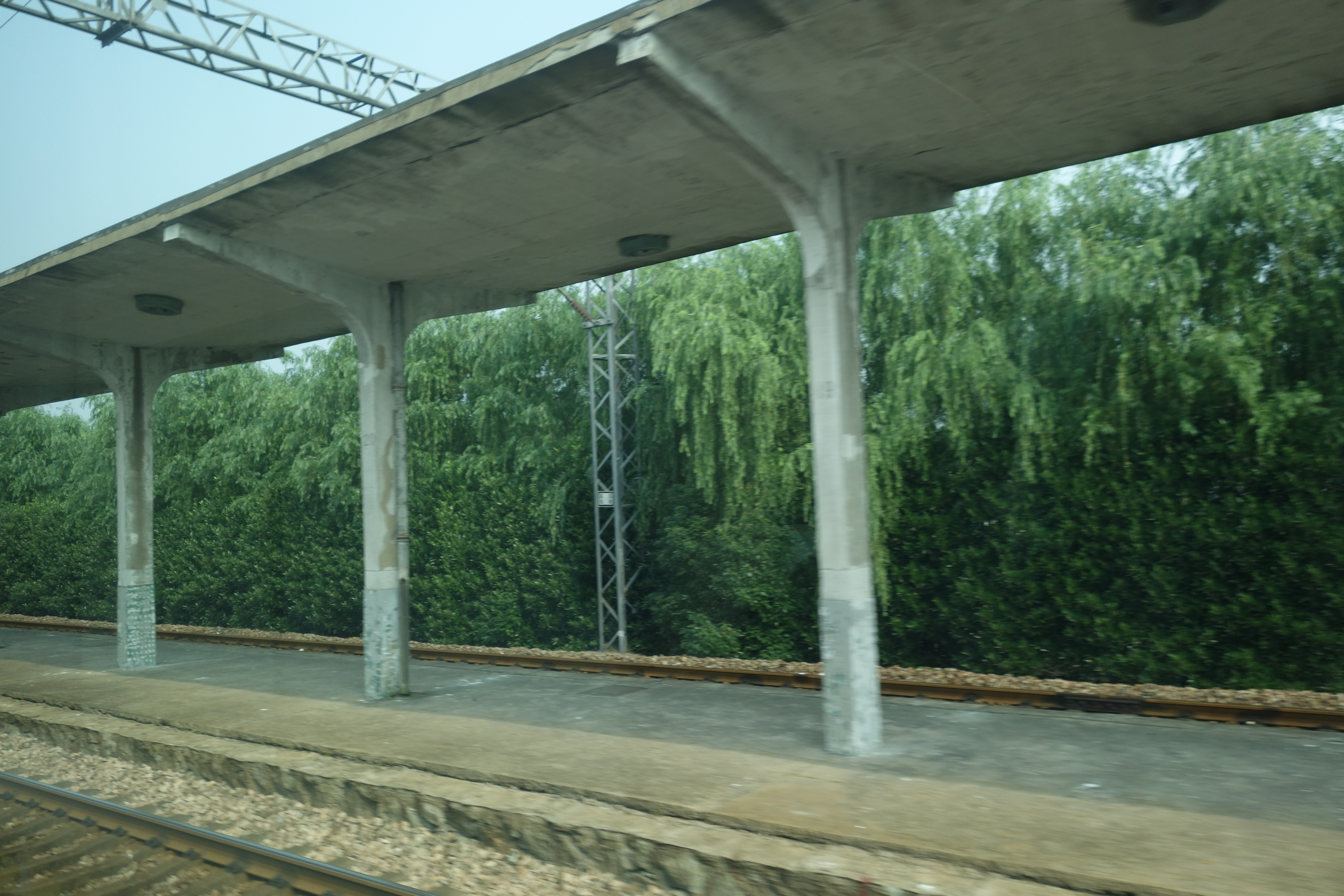 斜桥站站台